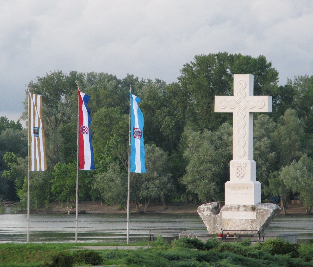 Zastave Vukovarsko-srijemske županije, Republike Hrvatske i Grada Vukovara pored križa na ušću Vuke u Dunav u Vukovaru